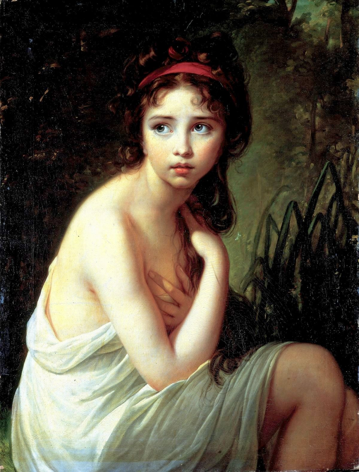 Portrait of Julie Lebrun